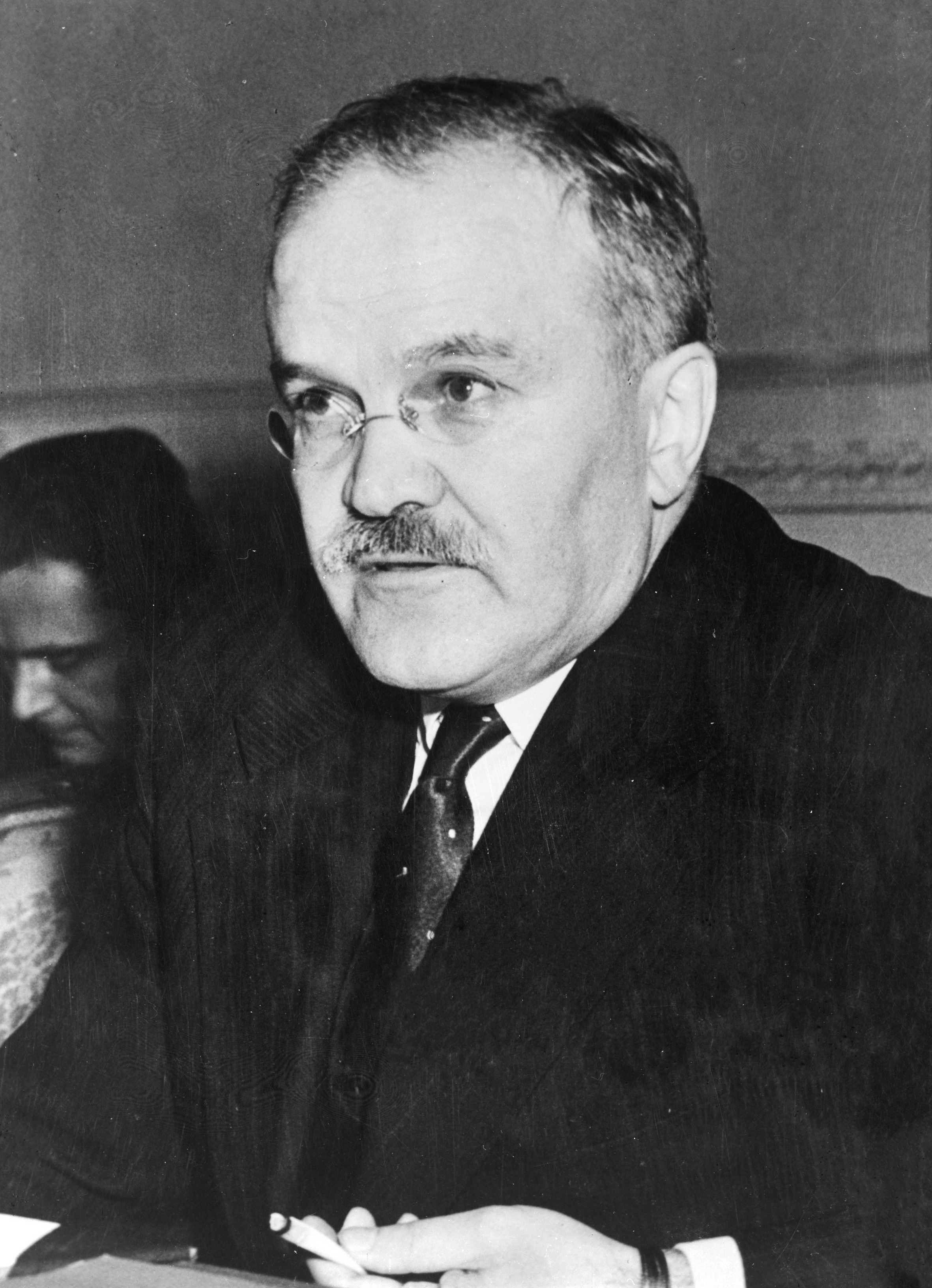 Vyacheslav Molotov